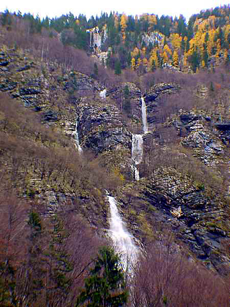 Navišji zabeleženi slap v Sloveniji v bližini Savice - je nestalen in pada čez steno Komarče